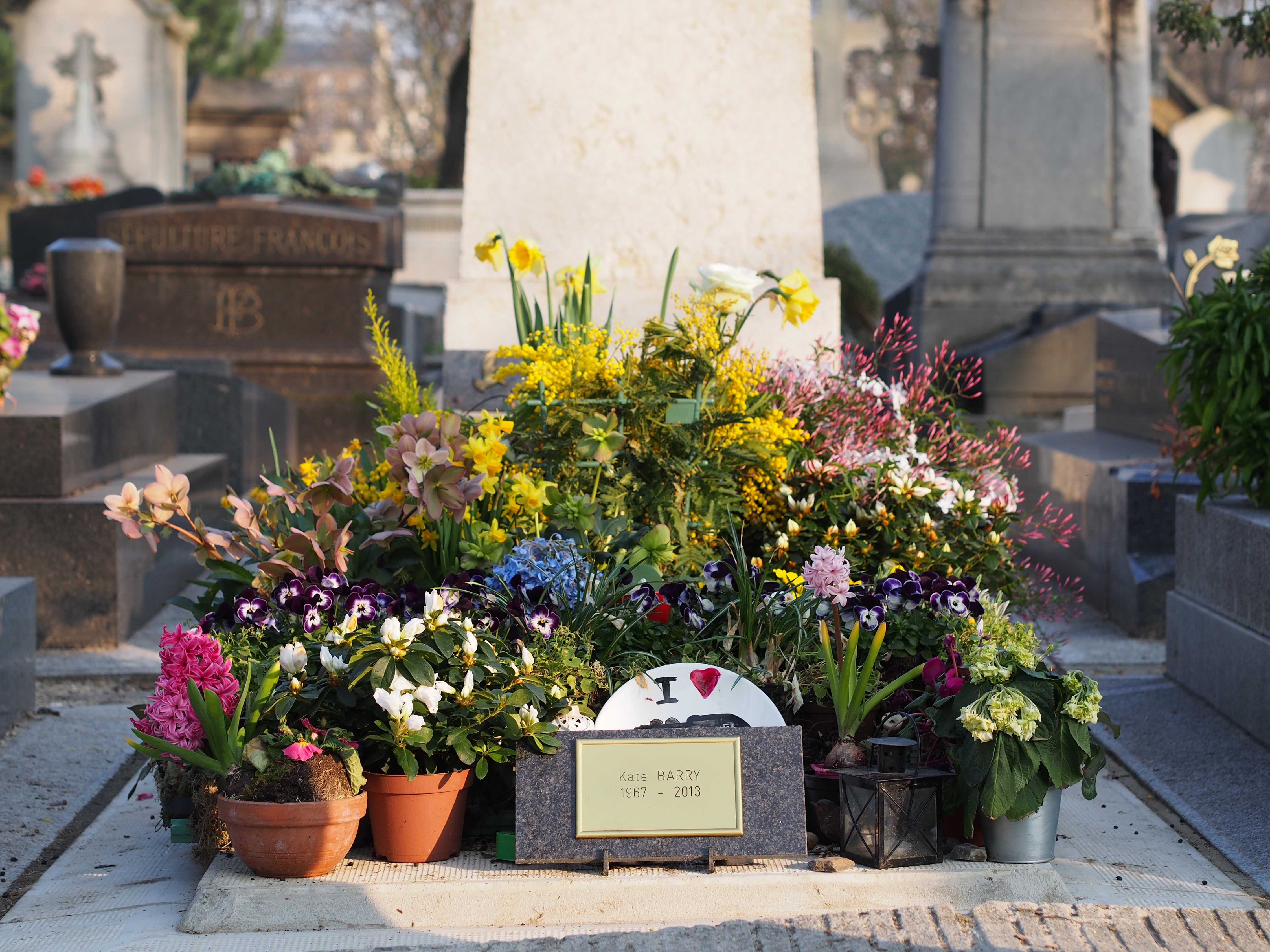 Tombe de Kate Barry (1967-2013) - au cimetière du Montparnasse (Paris, France).